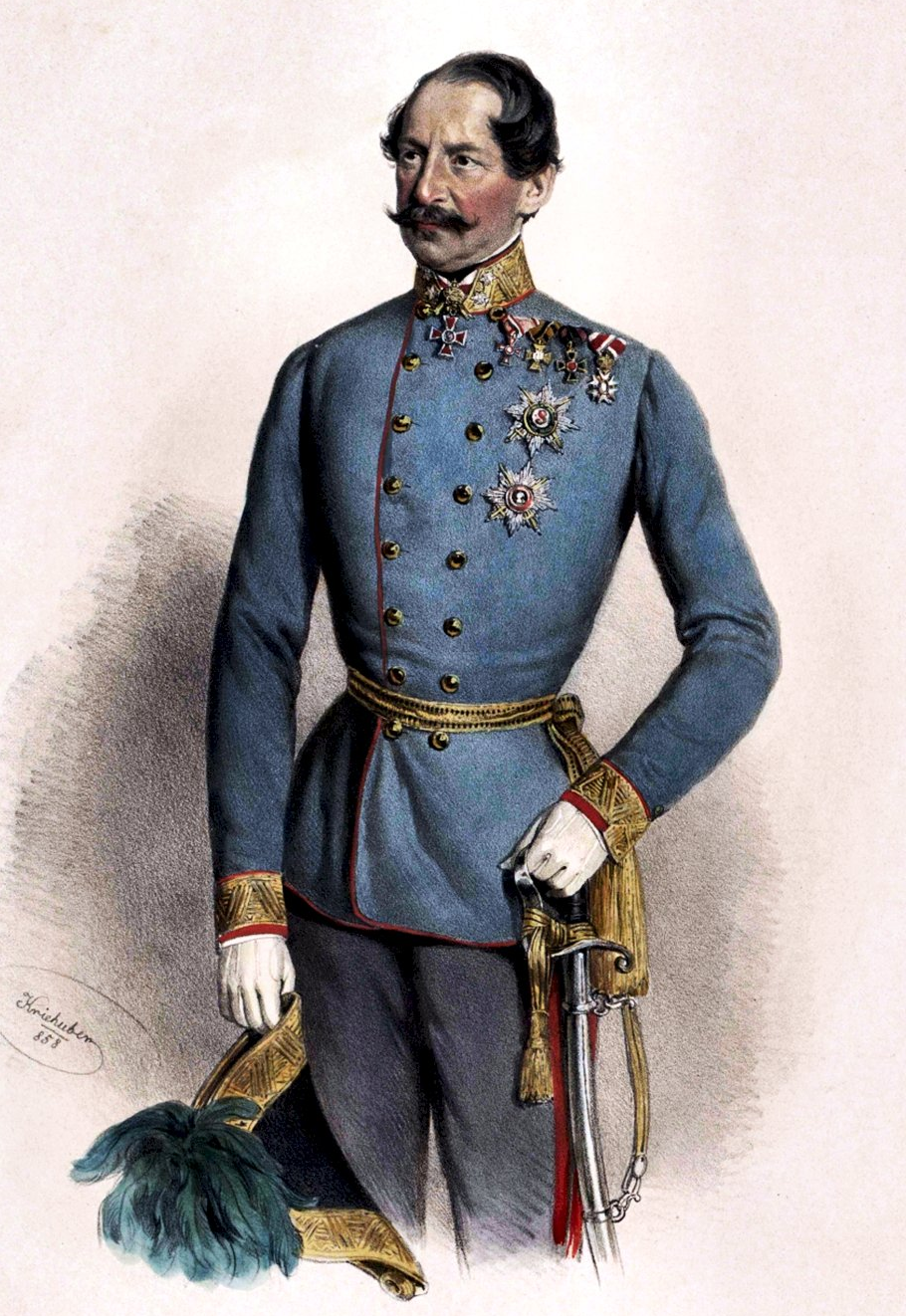 Stefan Freiherr von Wernhardt (1806-1869), k. k. Feldmarschallleutnant, im Jahr 1858